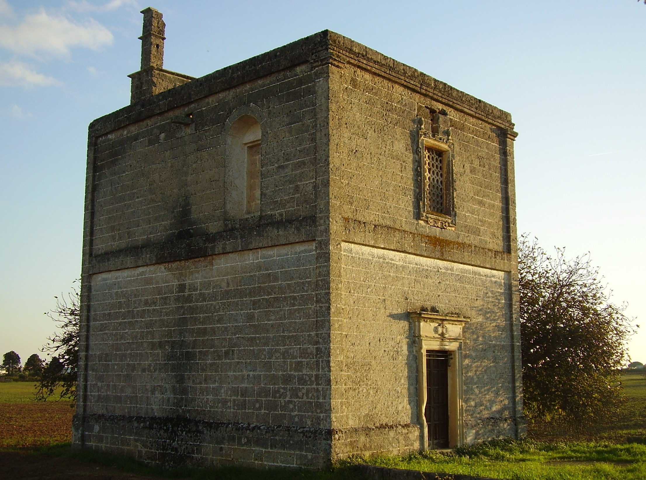 Chiesa Sant'Antonio da Padova Arnesano, Lecce